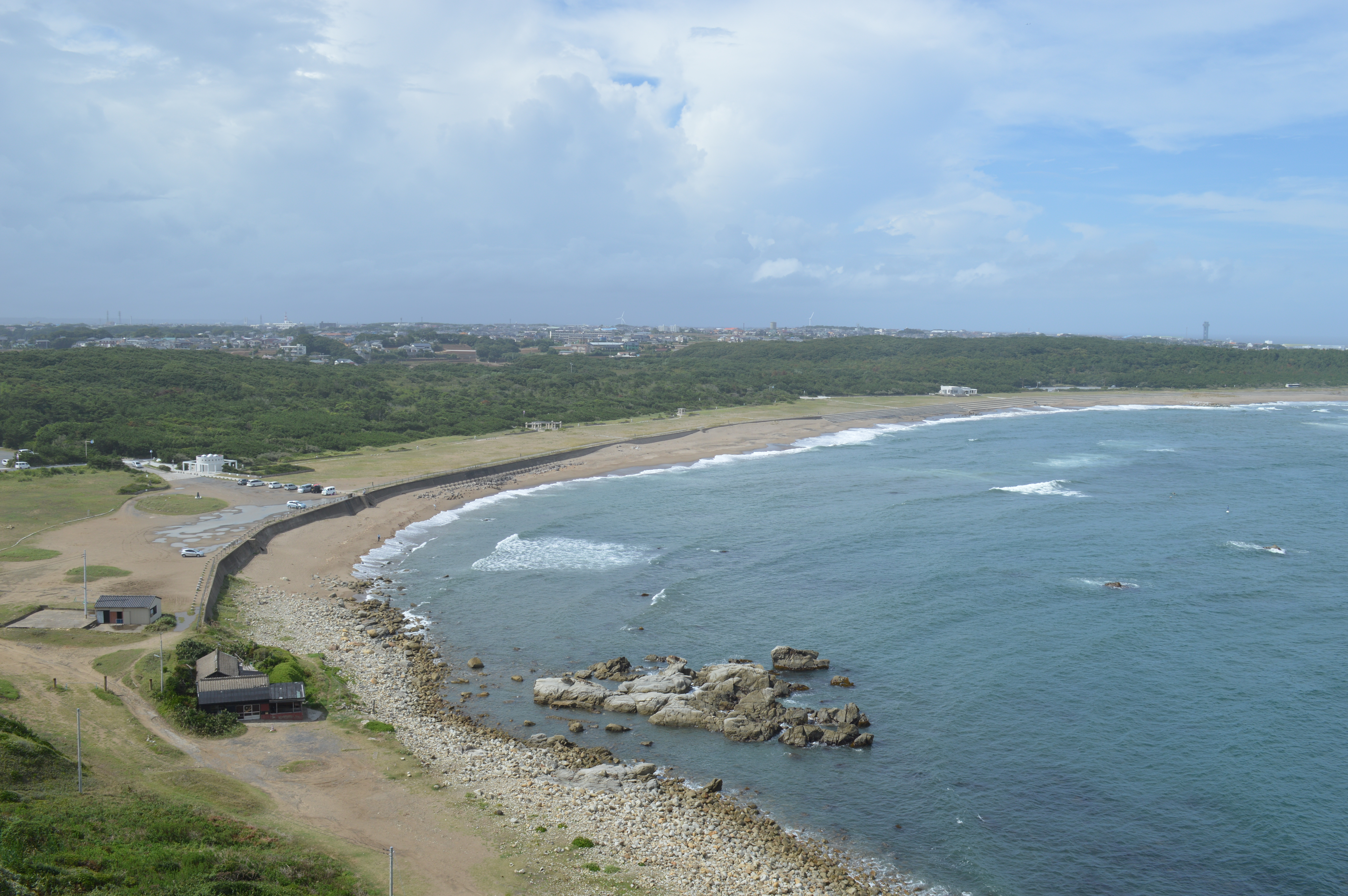 千葉県銚子市の犬吠崎灯台から見た君ヶ浜